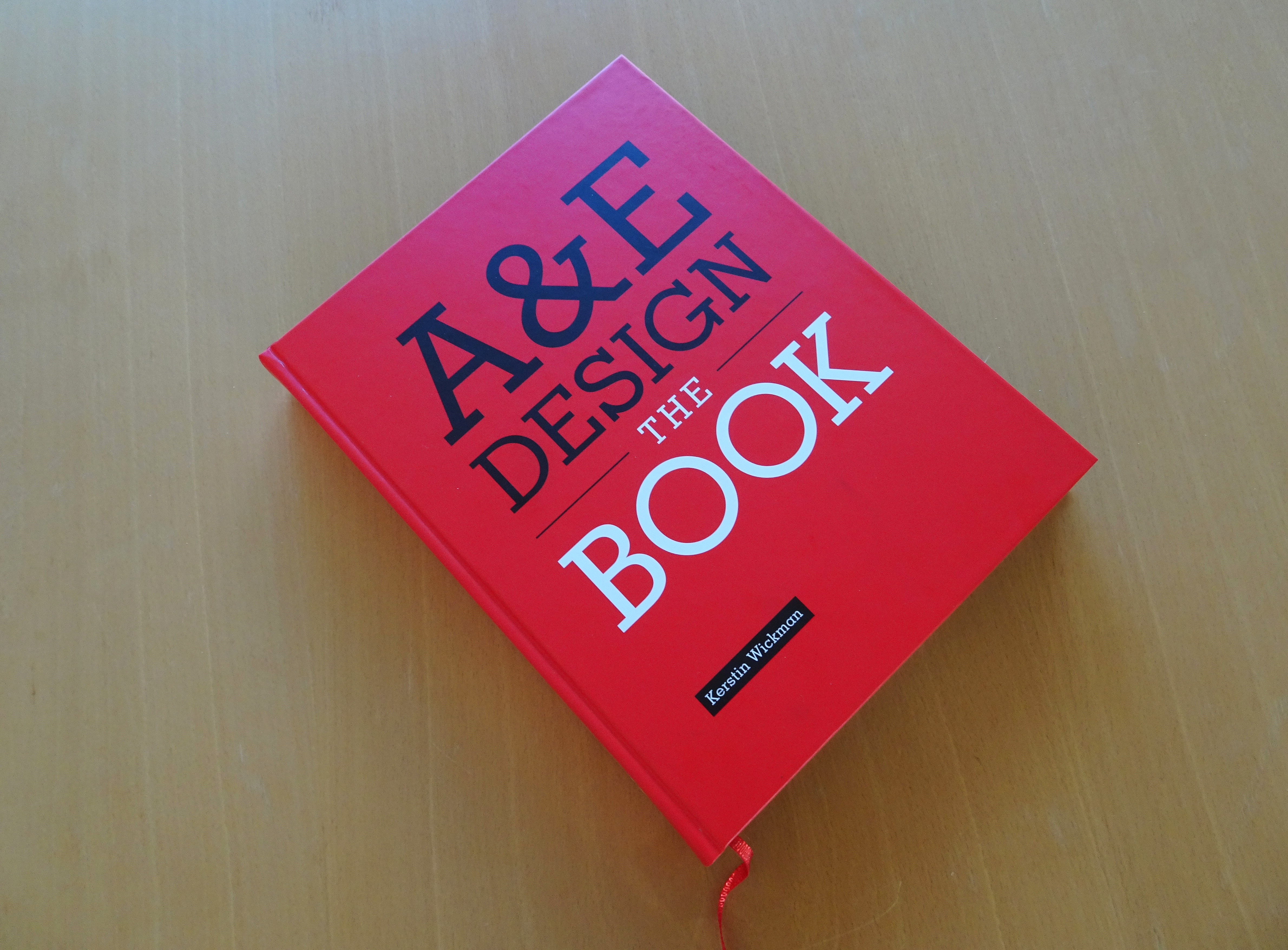 A&E Design The Book av Kerstin Wickman